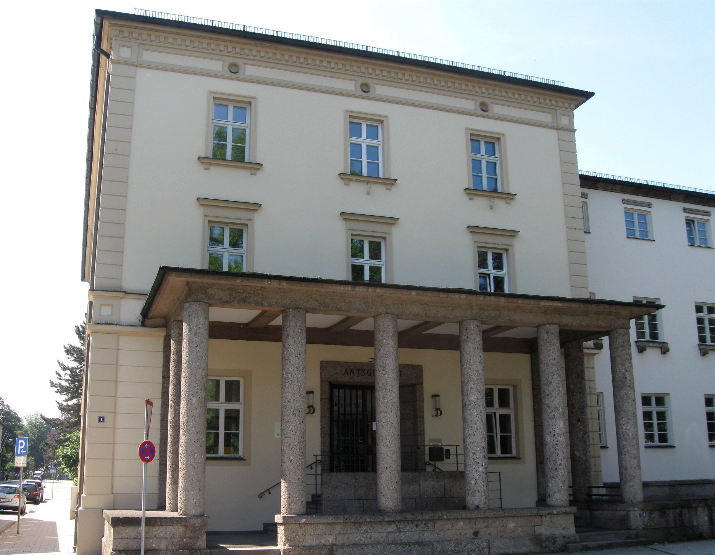 Bismarckstraße 1; Amtsgericht Rosenheim, dreigeschossiger Verwaltungsbau in Formen des Klassizismus und der Renaissance, um 1870/80, Flügelbau und Kolonnade neuklassizistisch um 1935